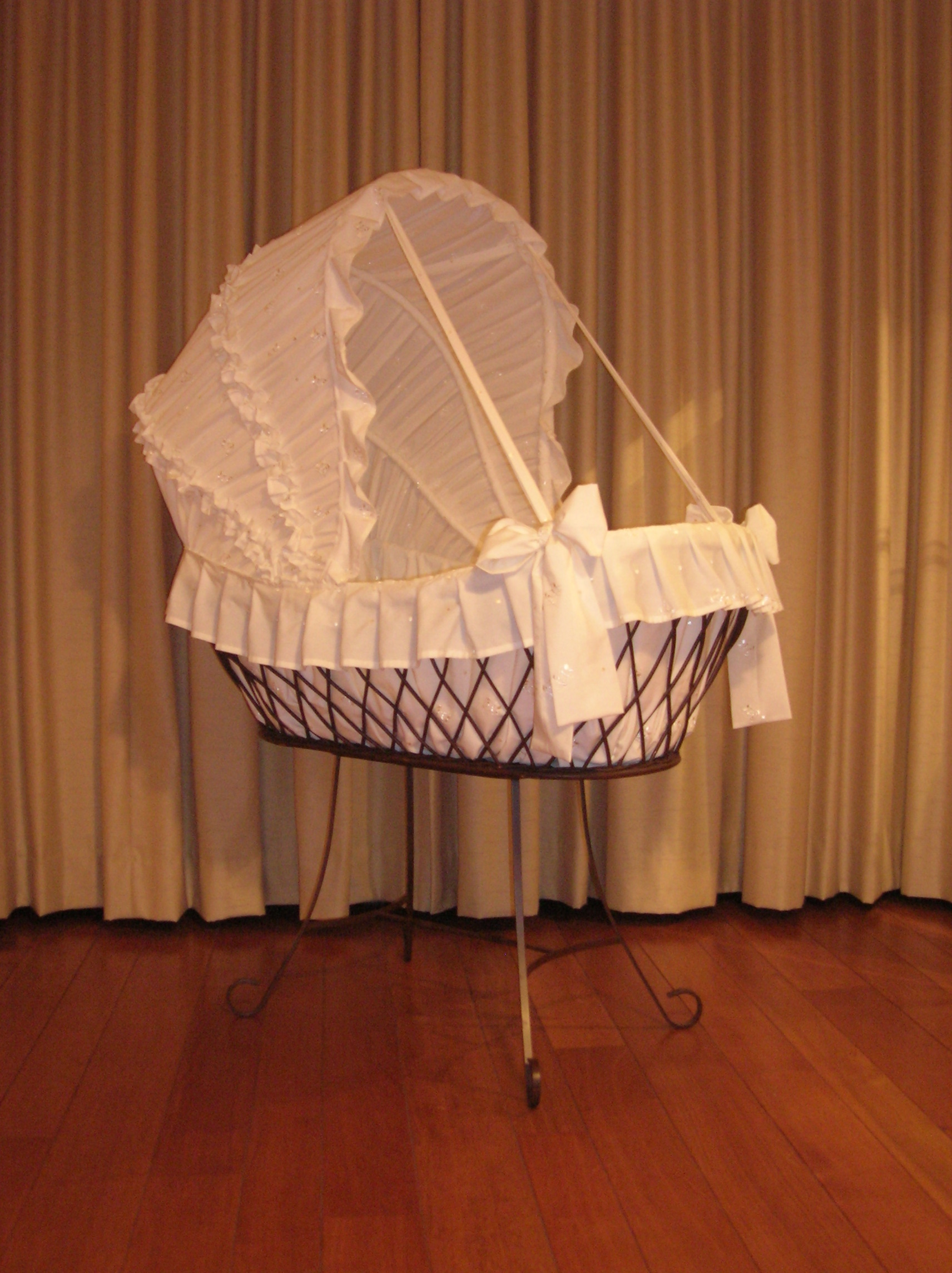 Zelfgemaakte foto, augustus 2006, (c) Erik1980: Een ouderwetse wieg, recent gerestaureerd.